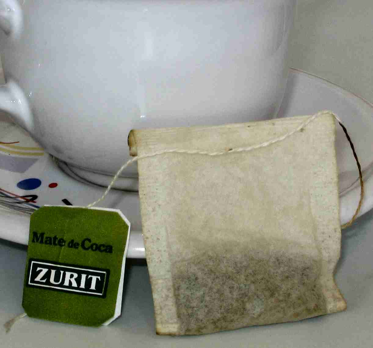 Teebeutel „Mate de Coca“ - Tee aus Cocablättern (Bolivianisches Produkt)